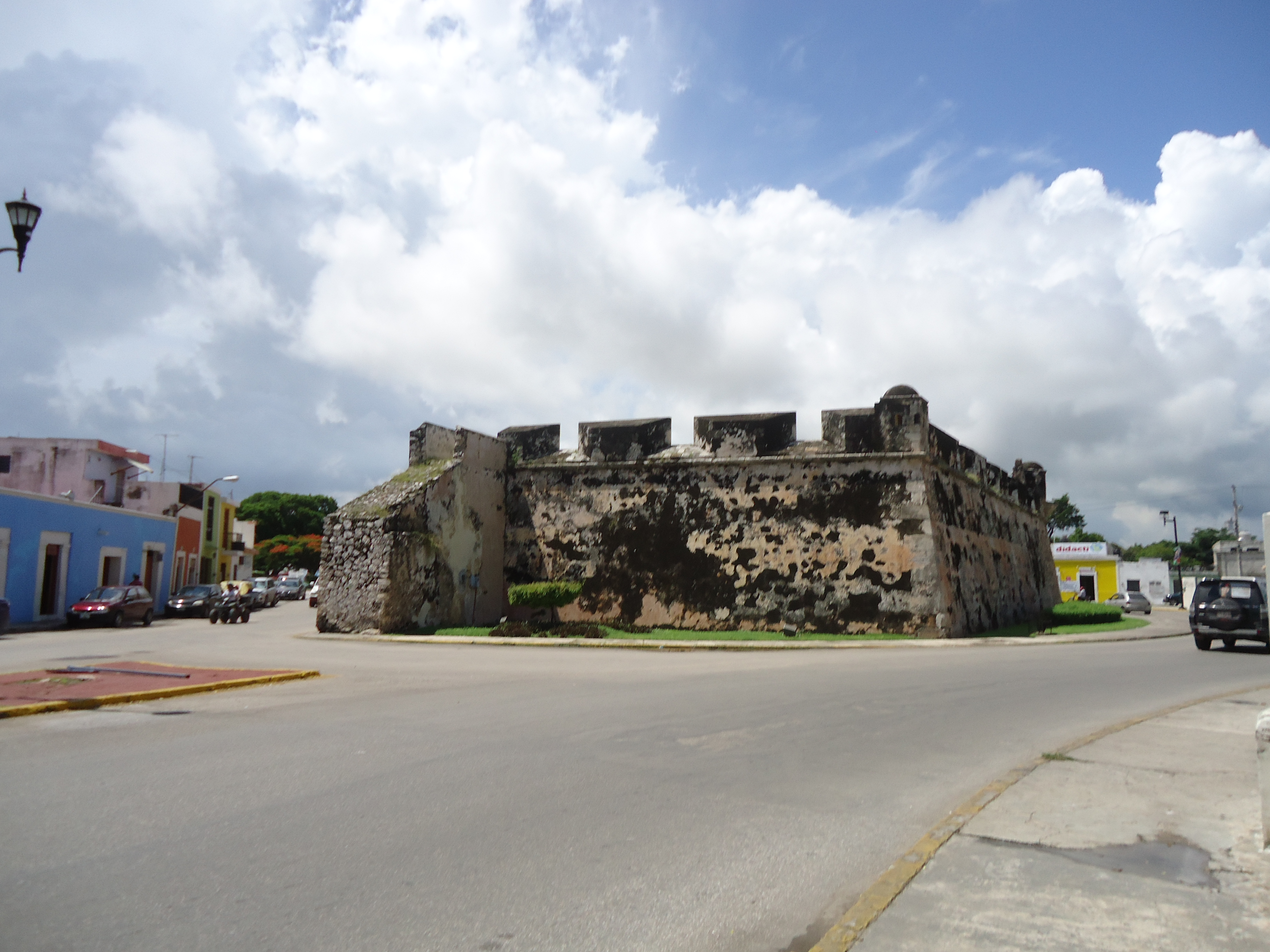 Fotografía del Baluarte de Santa Rosa, San Francisco de Campeche, Campeche